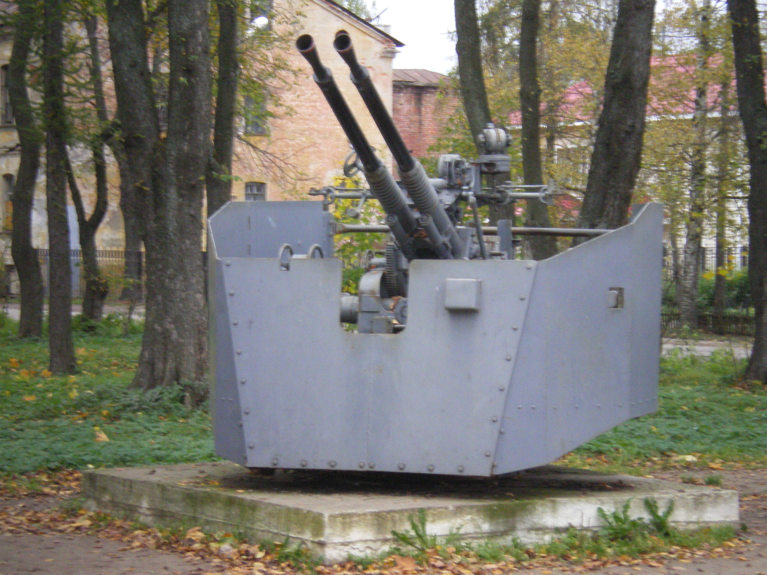 Шлиссенбург. Музей под открытым небом «Эхо былых сражений». Двухствольная (скорее всего, зенитная) пушка.